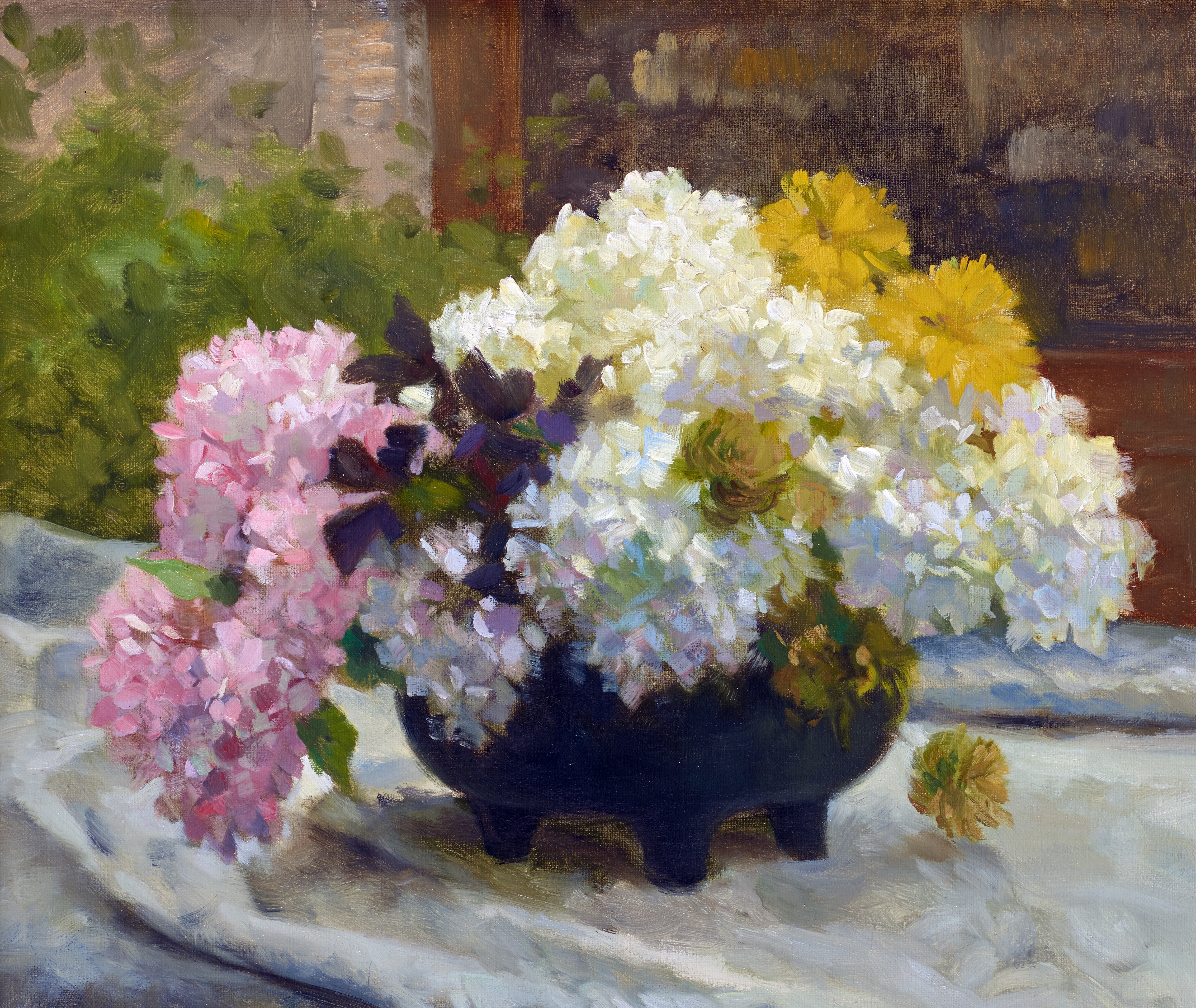 Heinrich Schmidt-Pecht: Hortensien in einer Vase; Öl auf Leinwand; 47,5 x 56,5 cm; Städtische Wessenberg-Galerie Konstanz, Nachlass Heinrich Schmidt-Pecht